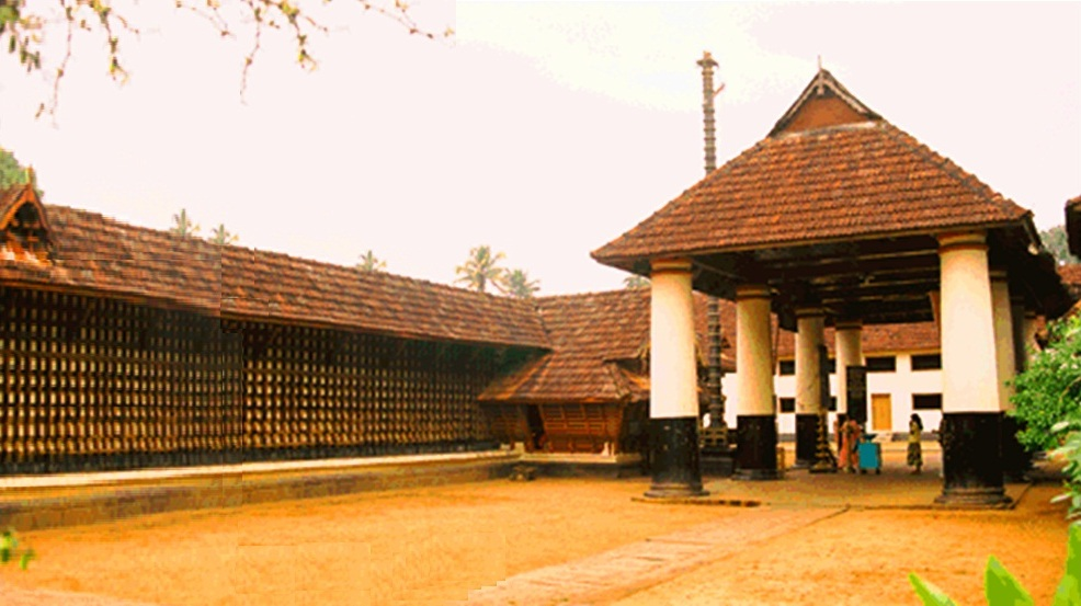 തൃക്കാരീയൂർ മഹാദേവക്ഷേത്രം